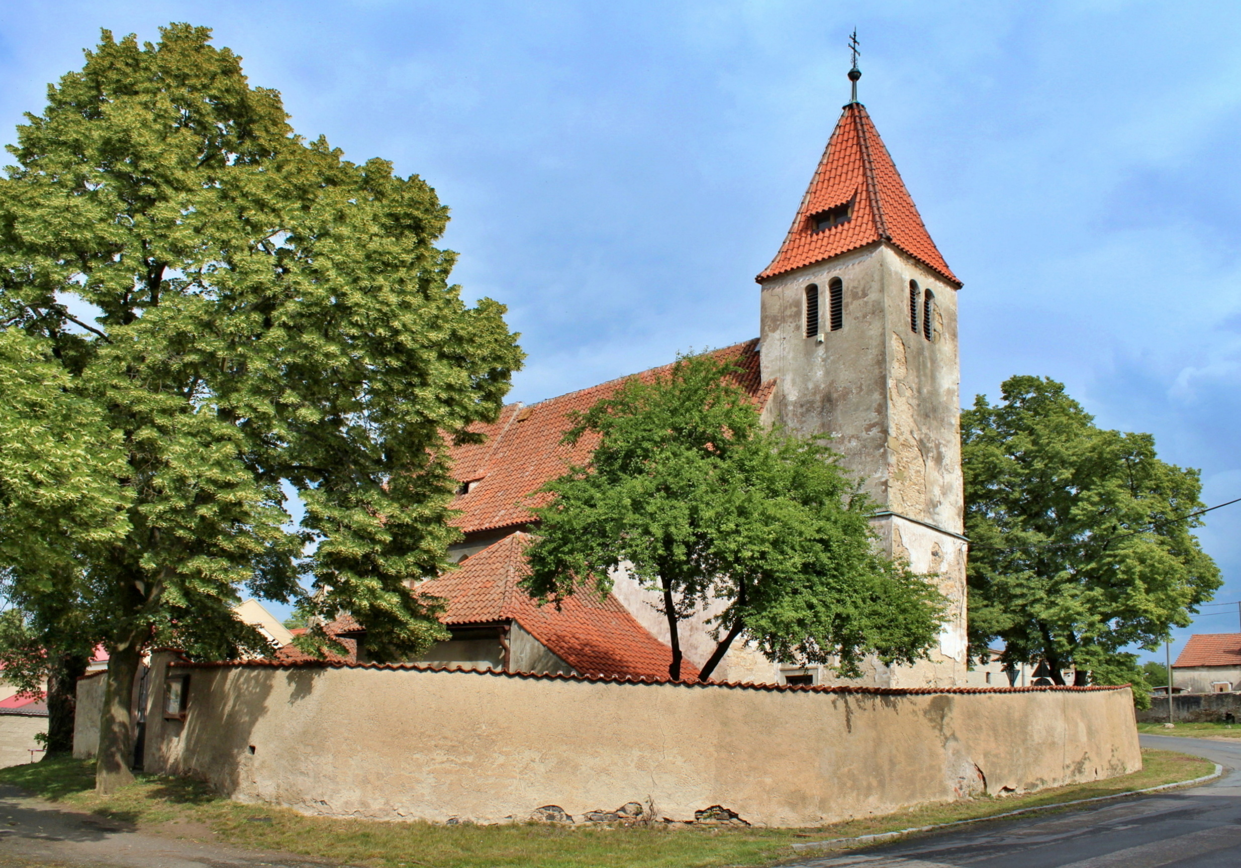 Kojetice kostel sv. Víta